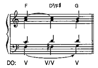 Armonía usando modificación cromática ascendente